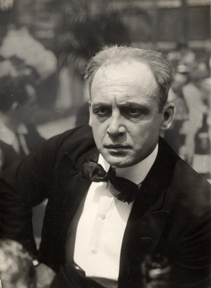 Film. 'Helleveeg', een film van Theo Frenkel. Première 1 oktober 1920. Co Balfoort als Hendiks. Nederland, 1920.